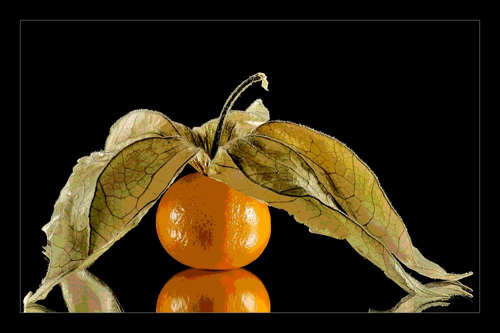 Physalis oder Kapstachelbeere (Physalis peruviana).